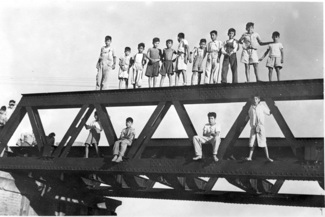 Los niños del film Tire dié (1960) de Fernando Birri, en el puente de Santa Fe donde todos los días persiguen un tren suplicando para céntimos.